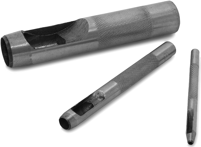 průbojník